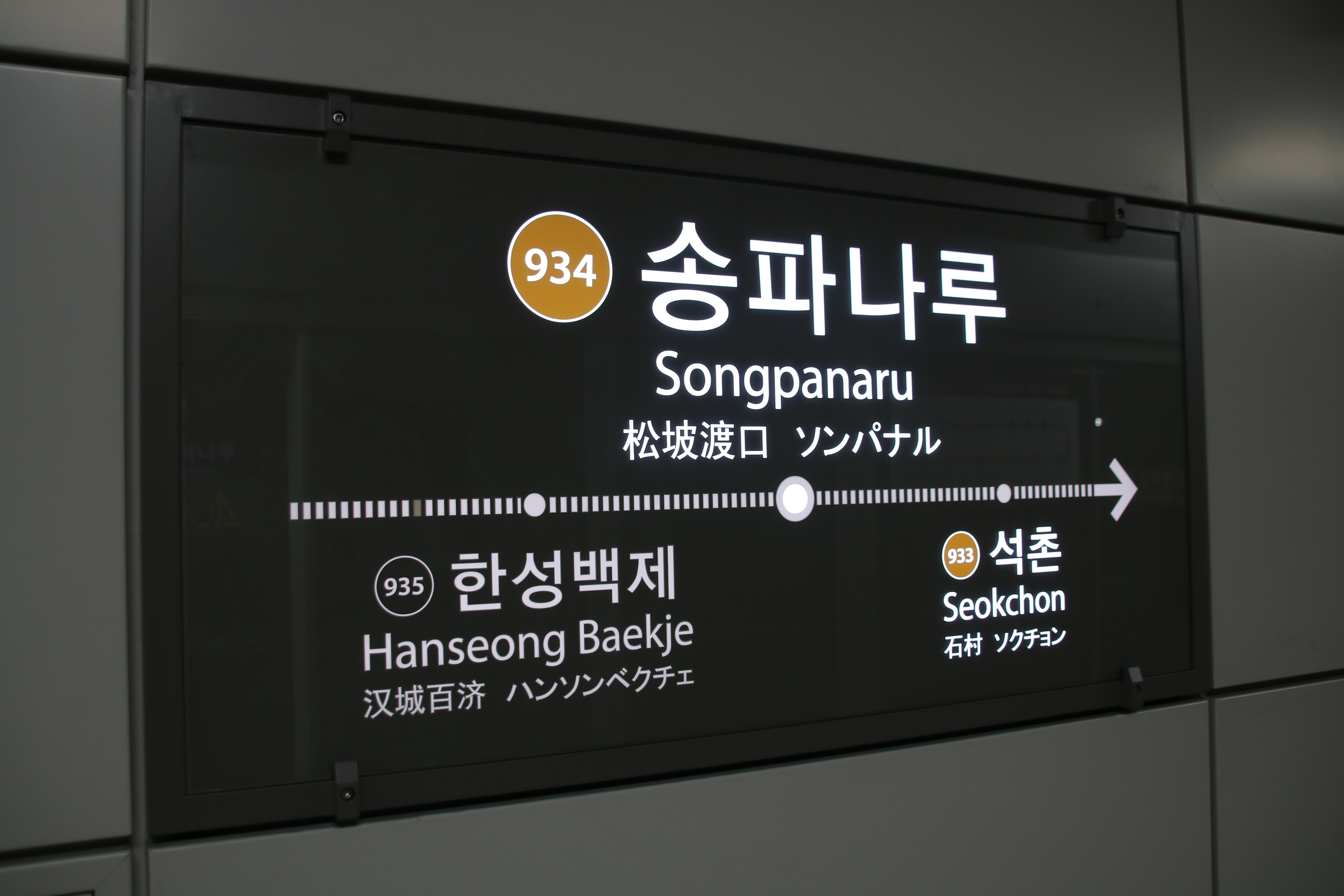 송파나루역 역명판